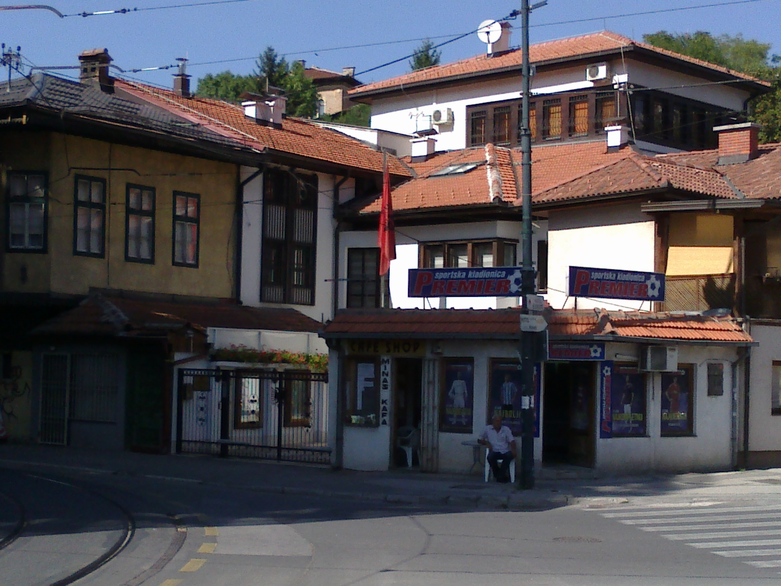 Albanian Embassy in Sarajevo